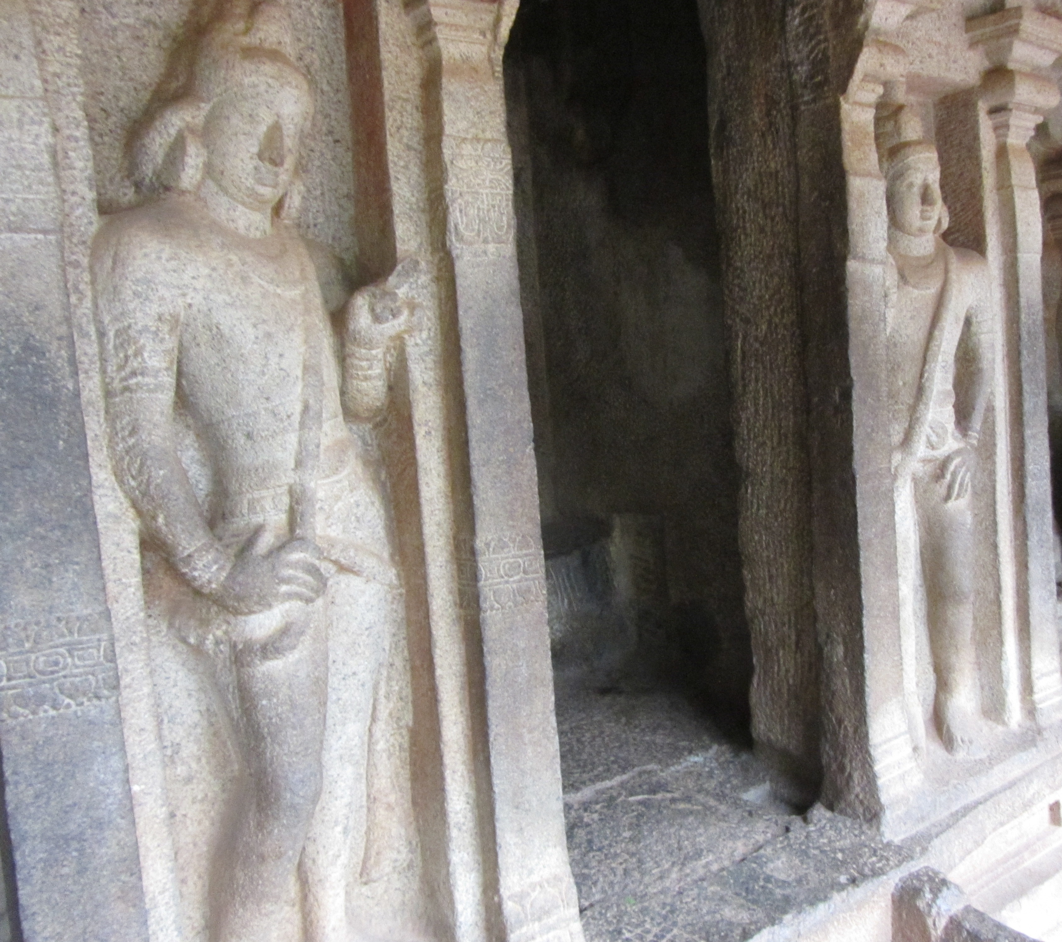 Twin-welcomes in temple sculpture. This kind of welcome figures are found almost all the temples in Tamil Nadu. Duvara Balagas. துவாரபாலகர் என்று கூறப்படும் வரவேற்ப்பு-வாயிற்காவலர் சிலை எல்லாக் கோயில்களிலும் காணப்படும். இது மாமல்லபுரம் வராக-மண்டபத்தில் காணப்படும் சிற்பம்.